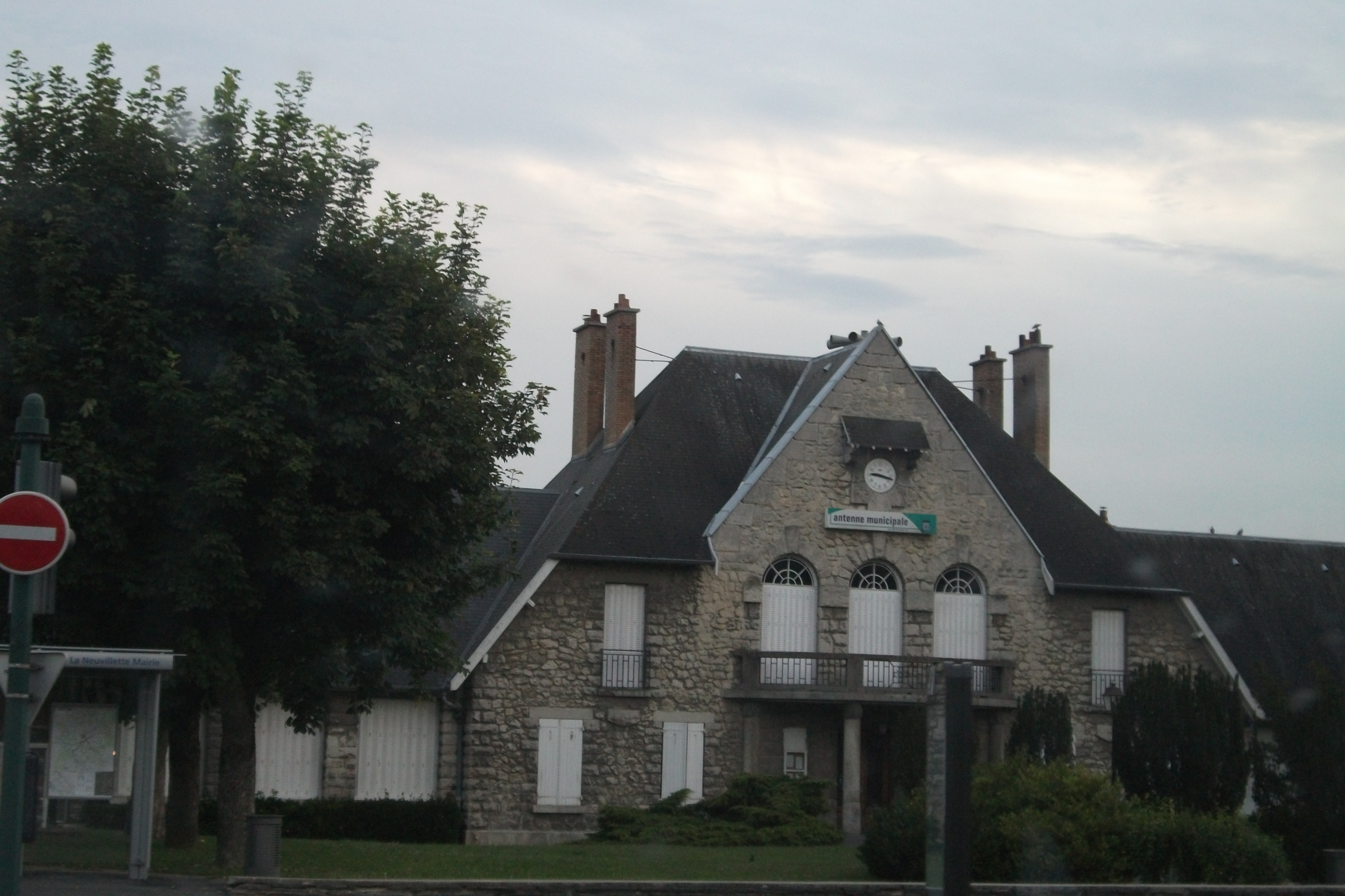 vue de ...